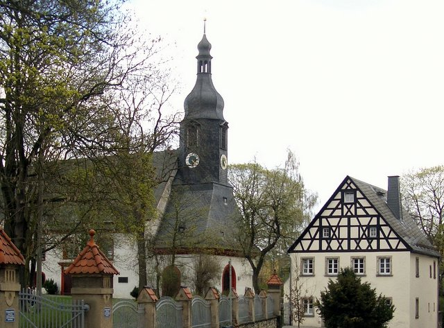 Hof (Saale), Lorenzkirche